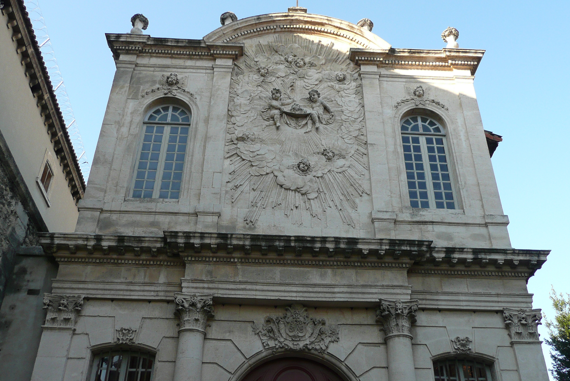 Eglise en Avignon